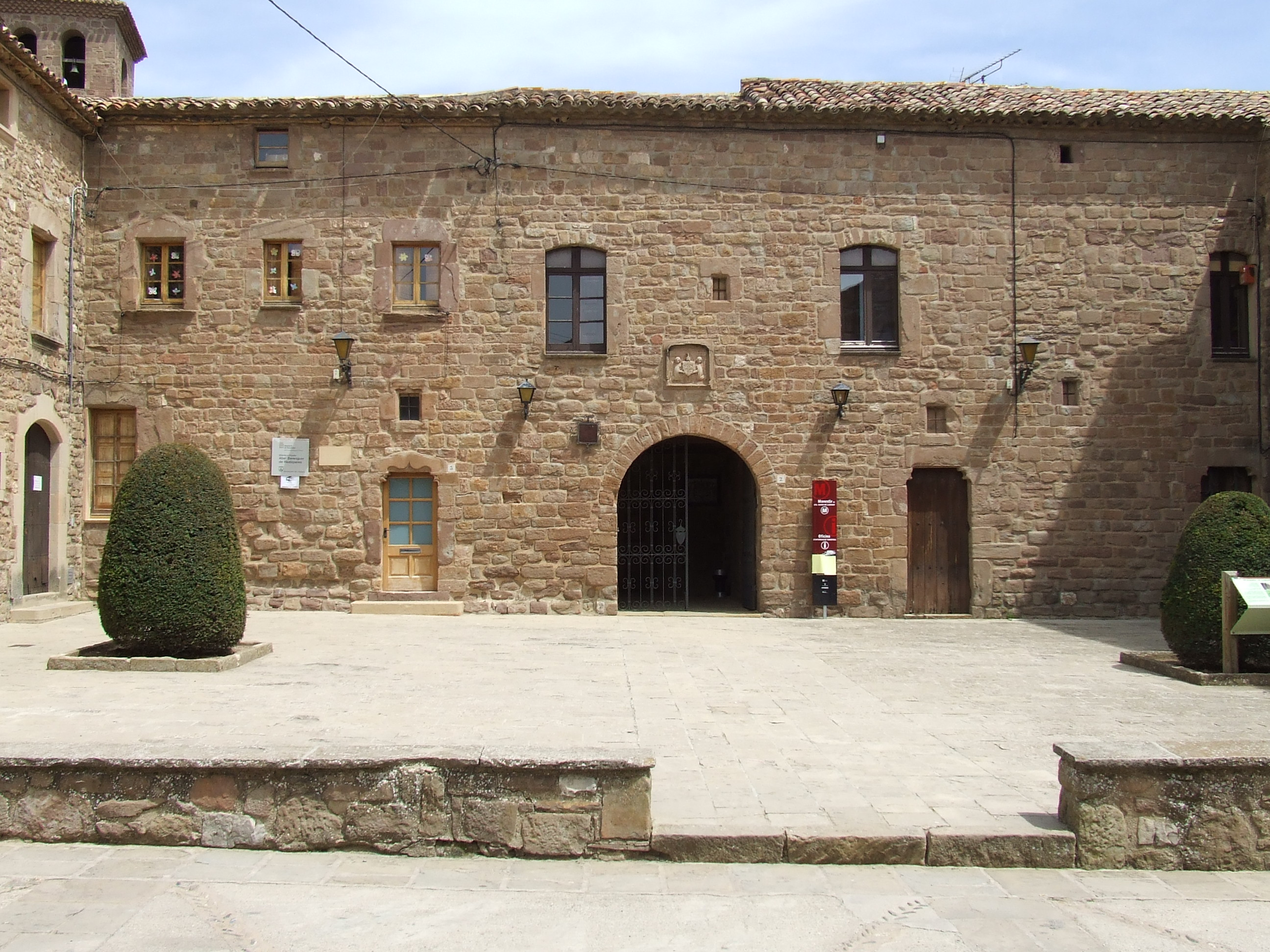 Santa Maria de l'Estany (Moianès)